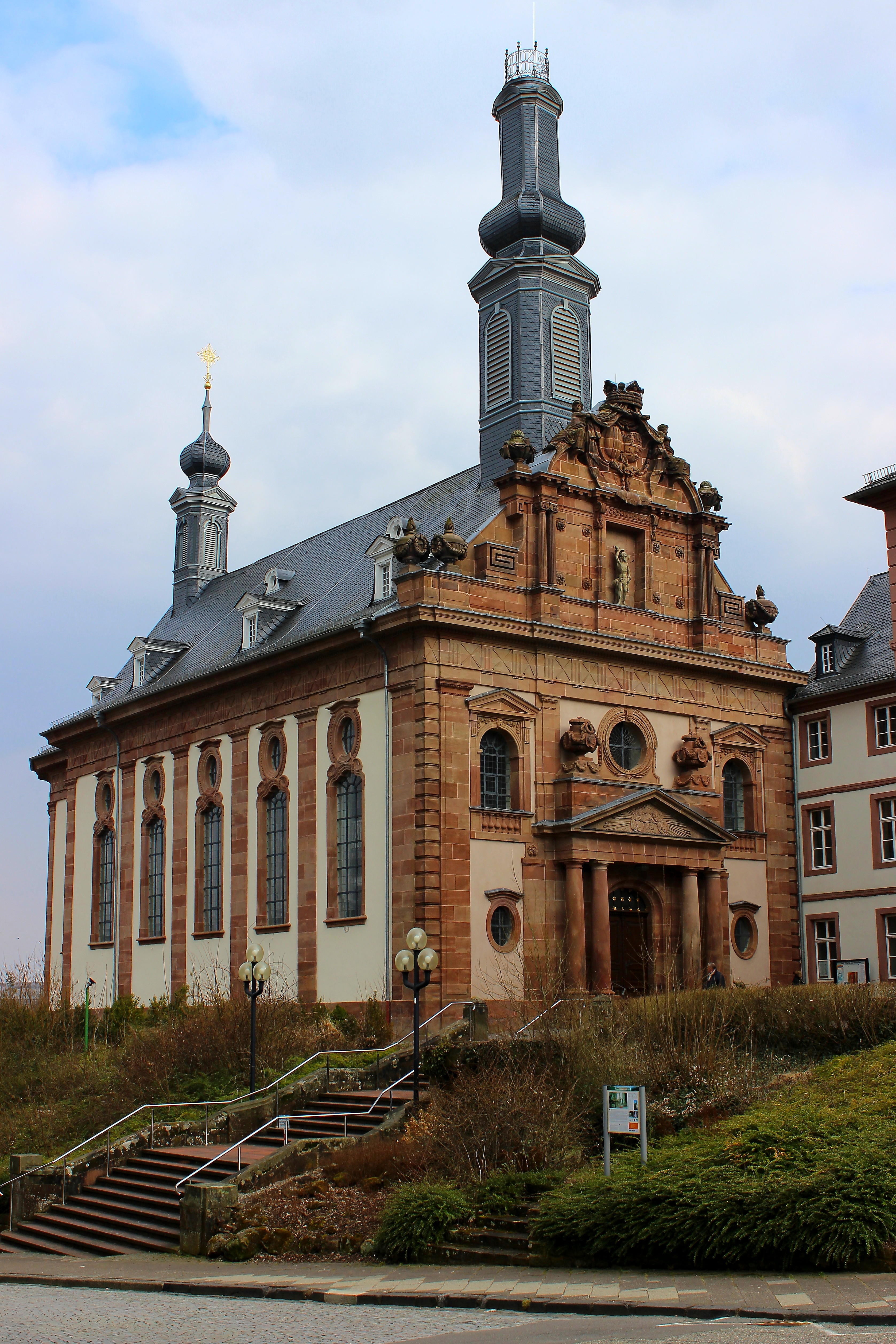 Schlosskirche, Blieskastel, Saarland